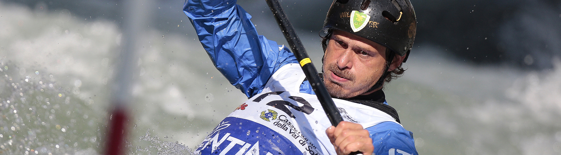 Andrea Benetti a Mezzana 2013 in C1